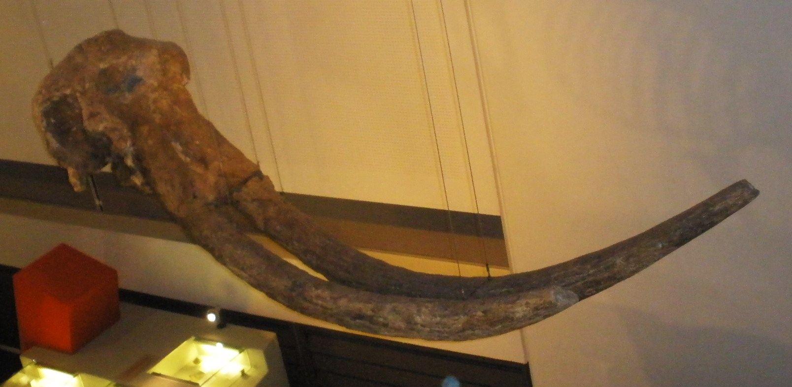 Fossil of Stegodon, an extinct elephant- Took the photo at Naturalis museum, Leiden